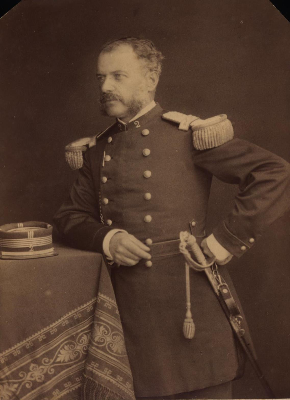 Eleuterio Ramírez Molina (Osorno; 18 de abril de 1836 - † Tarapacá; 27 de noviembre de 1879) Militar chileno, Héroe de la batalla de Tarapacá.